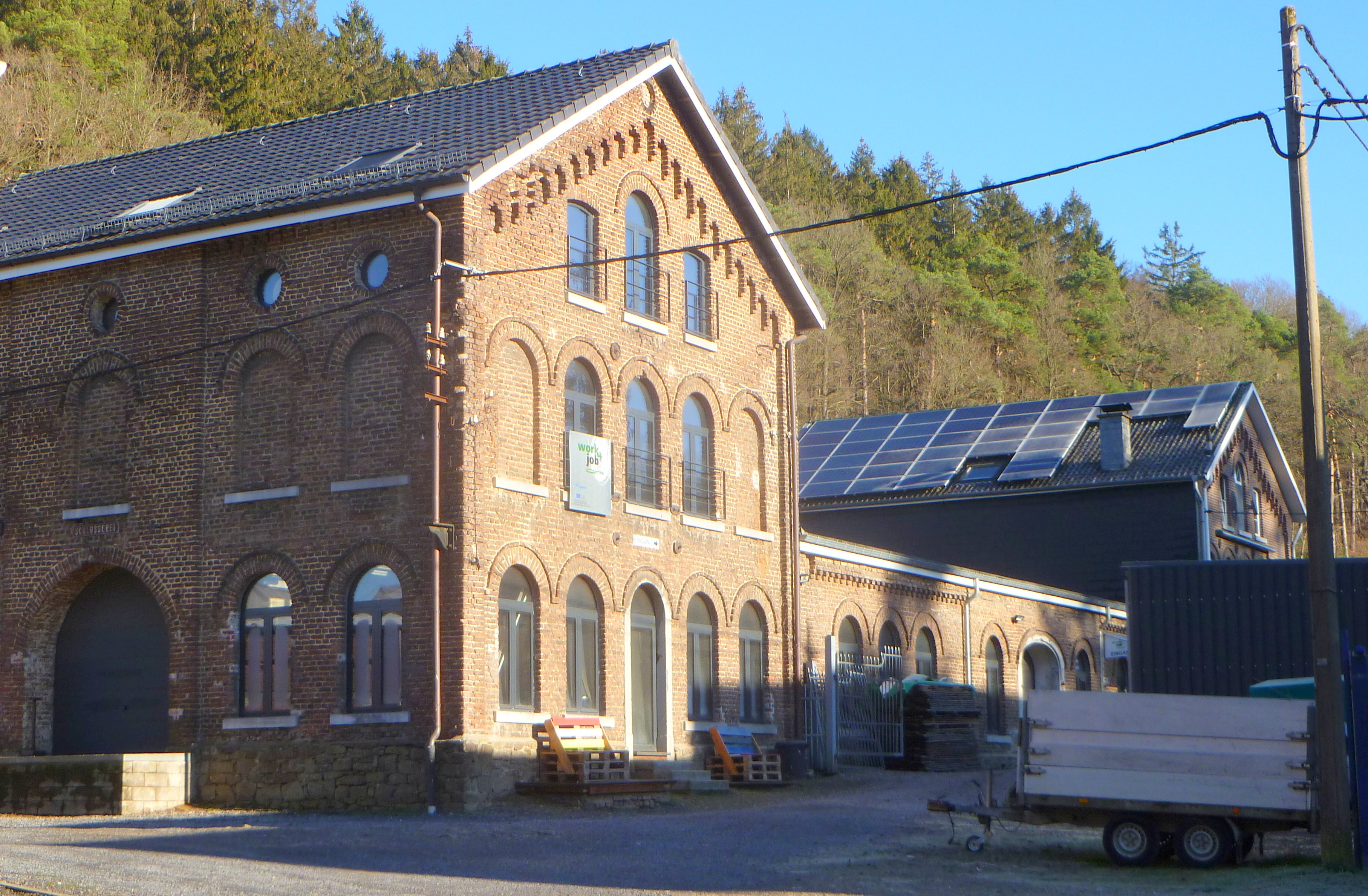 Ehemalige Tuchfabrik Wilhelm Peters & Cie in Eupen, Langesthal; Färbereigebäude